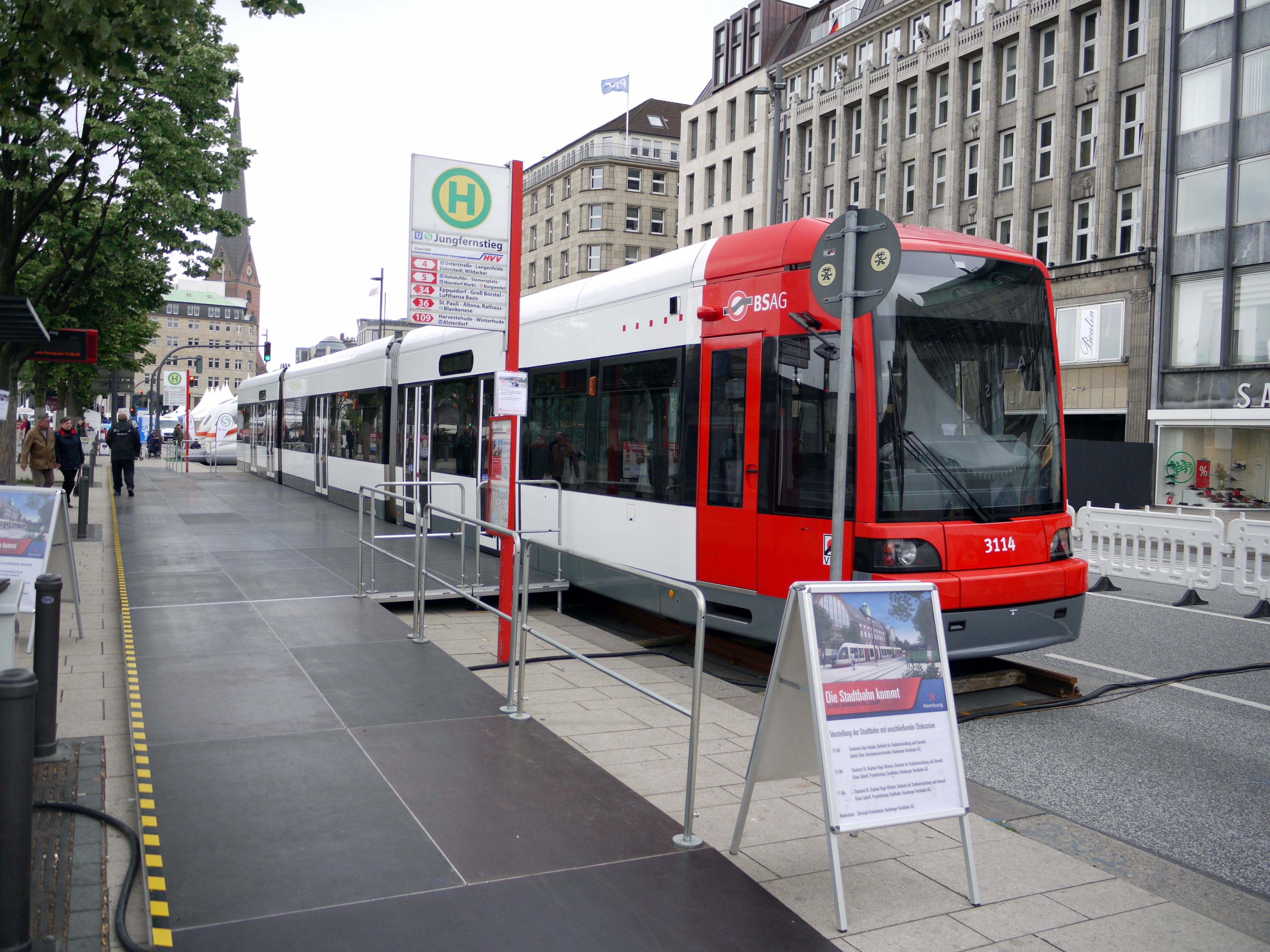 Straßenbahnwagen der BSAG zur Bewerbung der Hamburger Stadtbahn am Jungfernstieg in Hamburg.